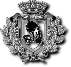 Logo de Combrée